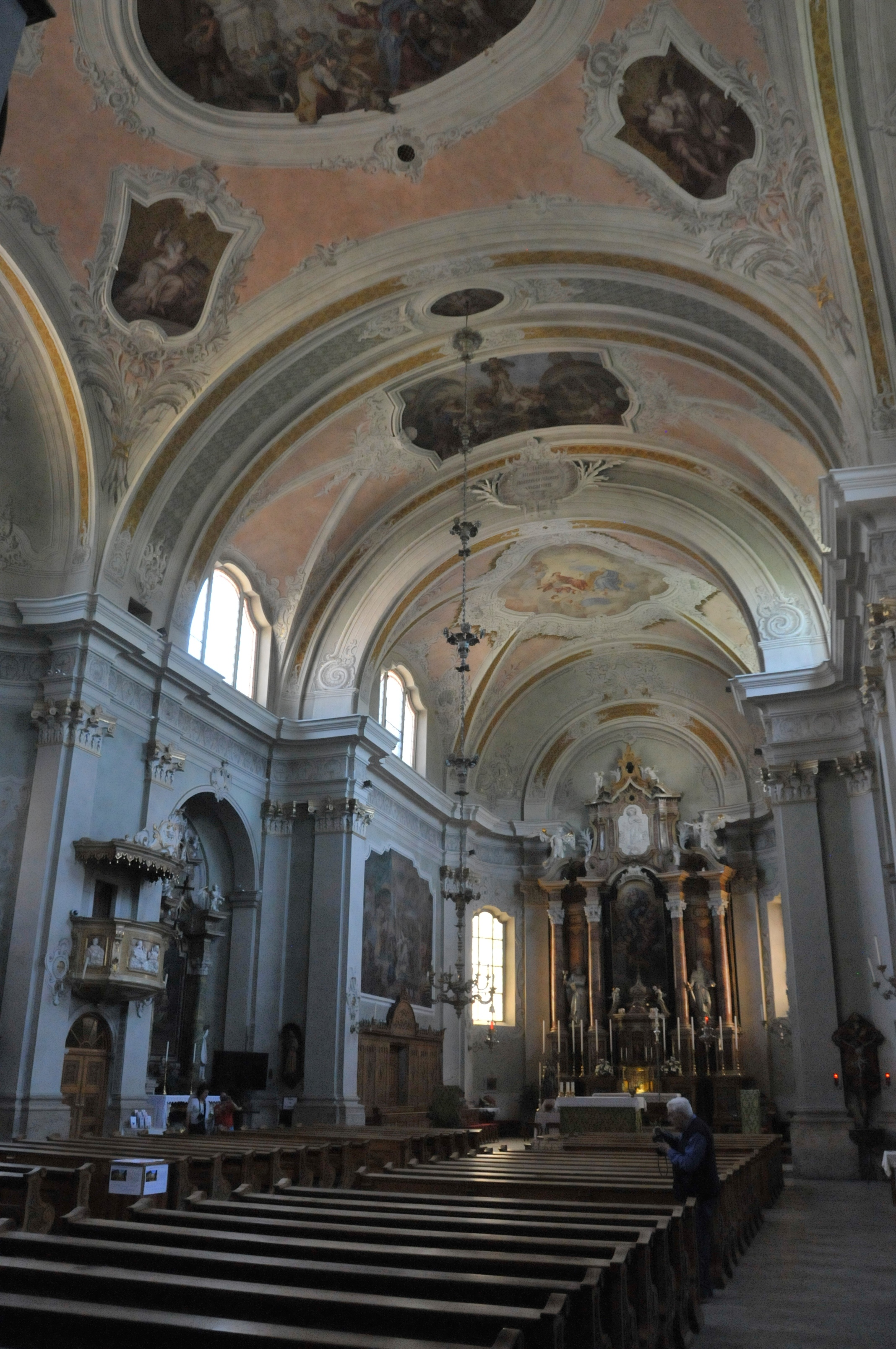 Cortina d'Ampezzo: Santi Filippo e Giacomo